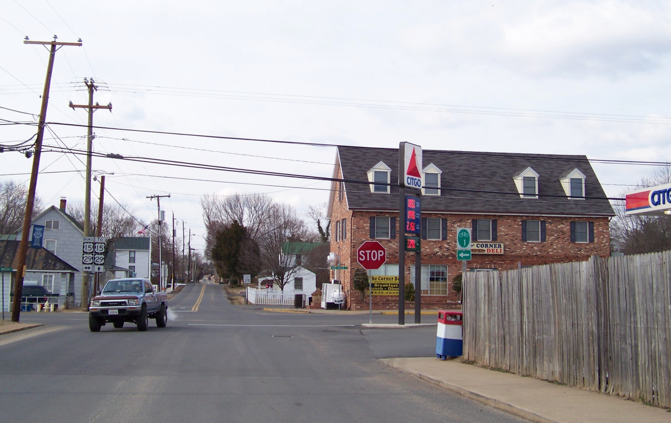 Remington, Virginia